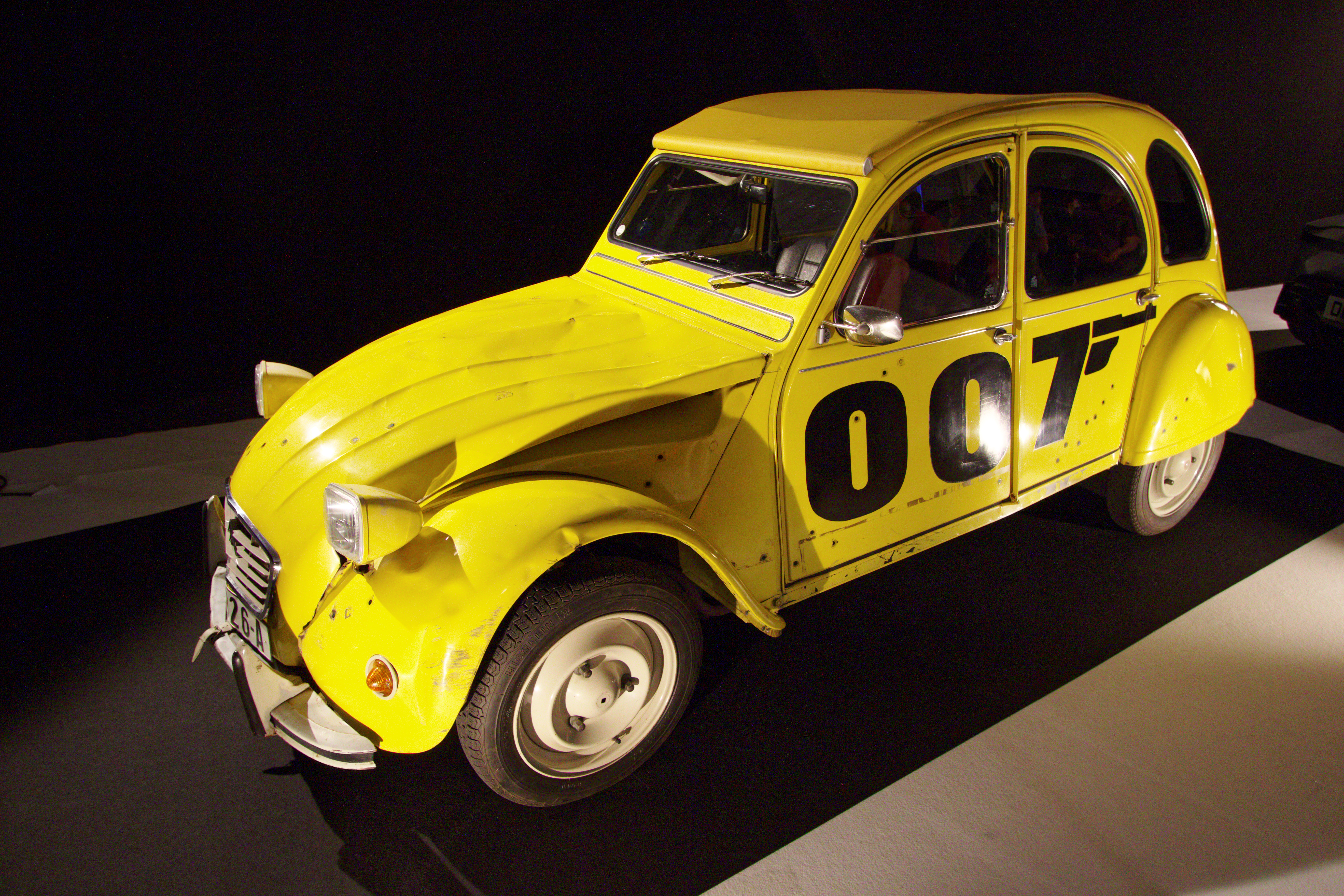 Une Citroën 2CV de 1980 présentée lors du mondial de l'automobile de Paris 2016. Cette voiture a été utilisée sur le tournage du film Rien que pour vos yeux.